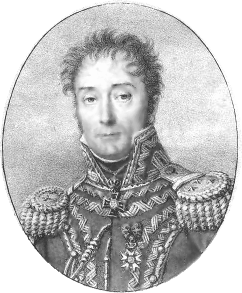 Generał Michał Sokolnicki